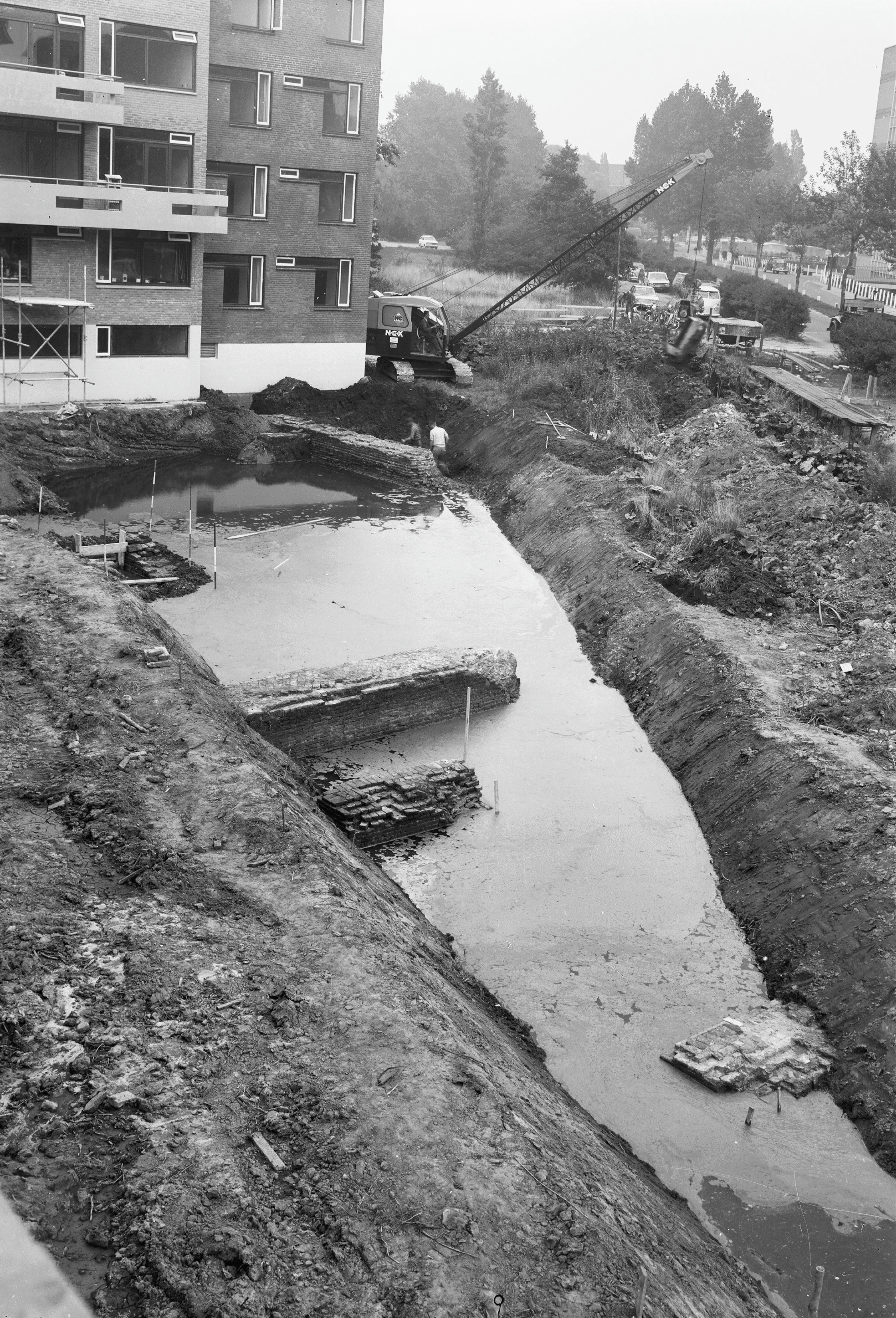 opgraving bij het Bos van Bosman, gelegen tussen de Blauwe Vogelweg, de Wassenaarseweg en de Rijnsburgerweg in de Vogelwijk. In de middeleeuwen tot aan 1420 stond op deze plek het kasteel Paddenpoel en later, tot 1574, het klooster Mariënpoel.